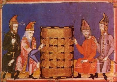 glosadores